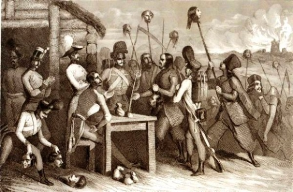 Galicyjska Żakieria